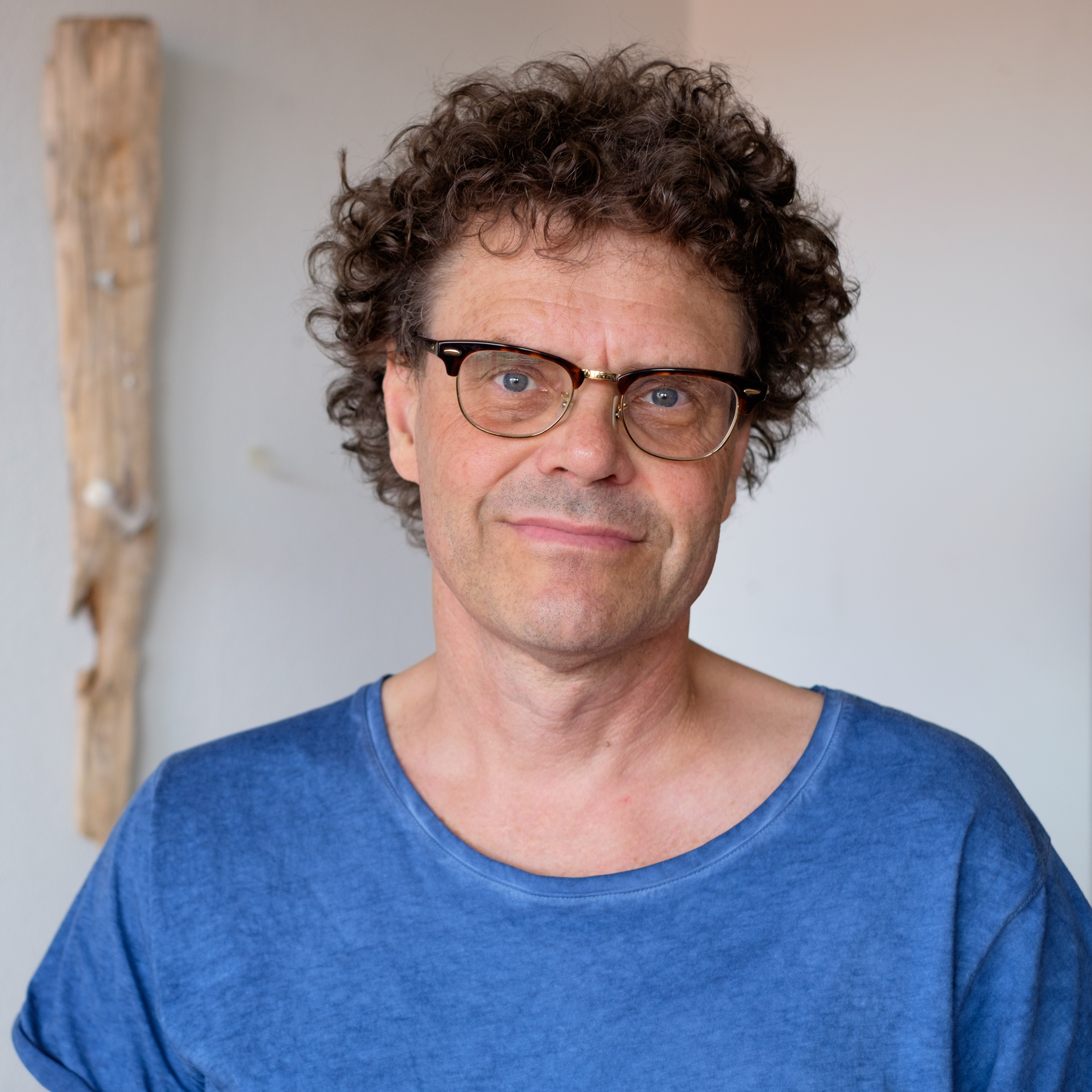 Porträtt i samband med release av albumet Trust